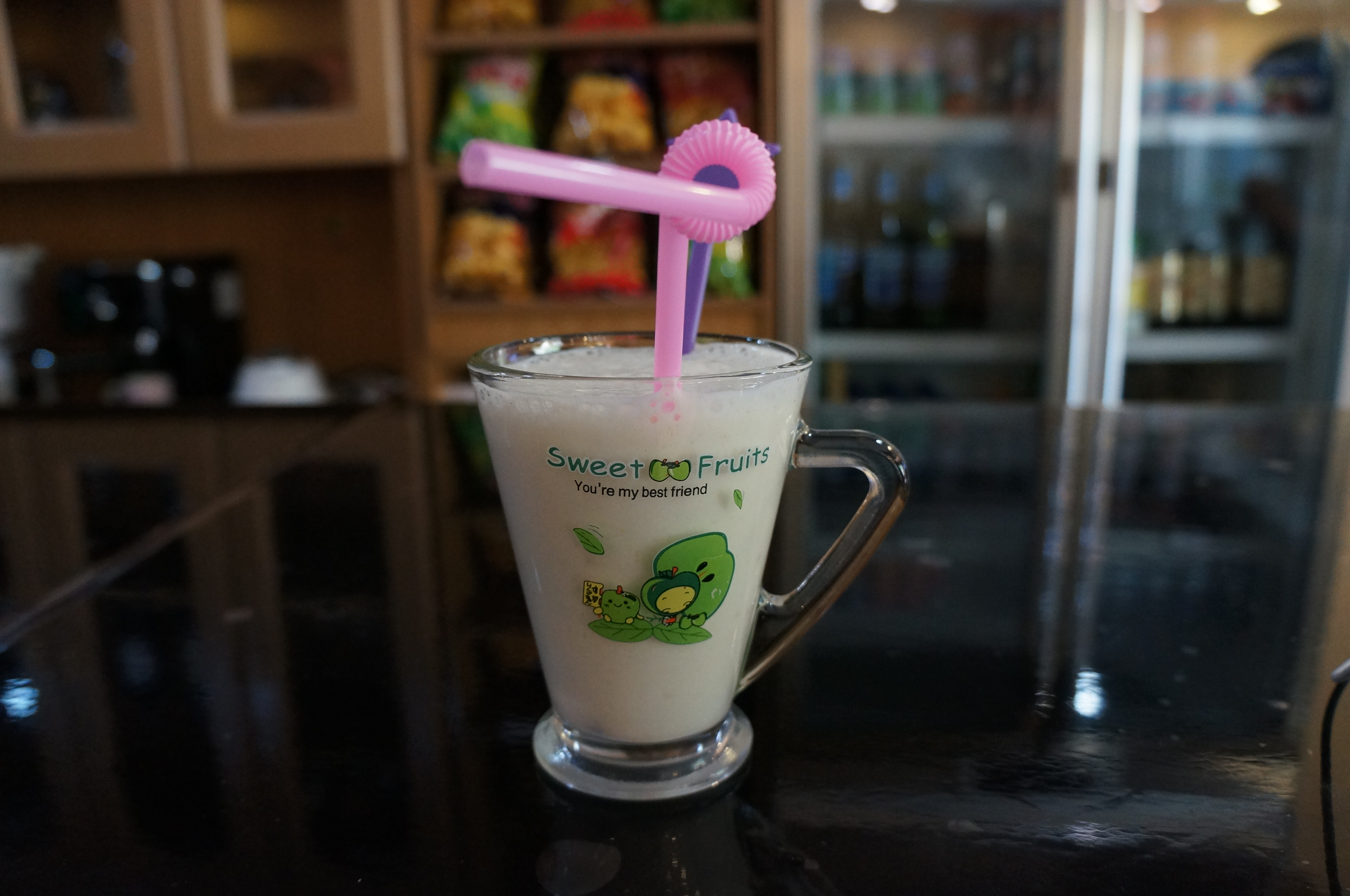 Banana shake at the Pyongyang Hotel Cafe